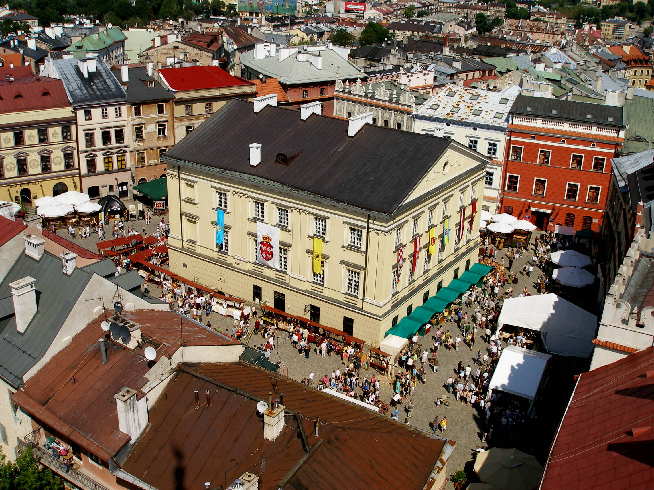 Stary ratusz, tzw. Trybunał, Rynek 1, XIV-XVI-1781; widok z Wieży Trynitarskiej; zabytek o nr rej.: A/223 z 14.02.1967